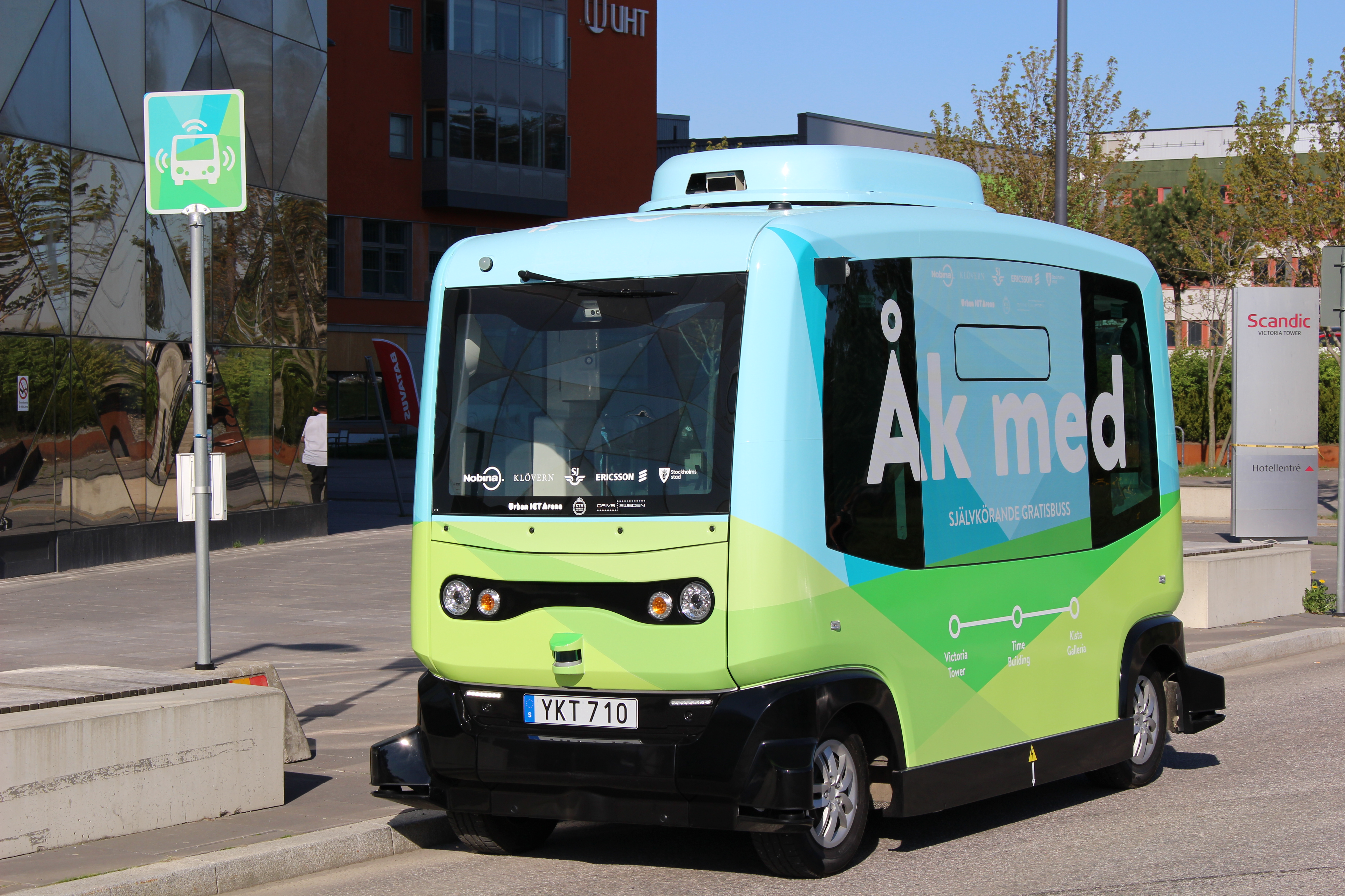 EZ-10 vid Victoria Tower